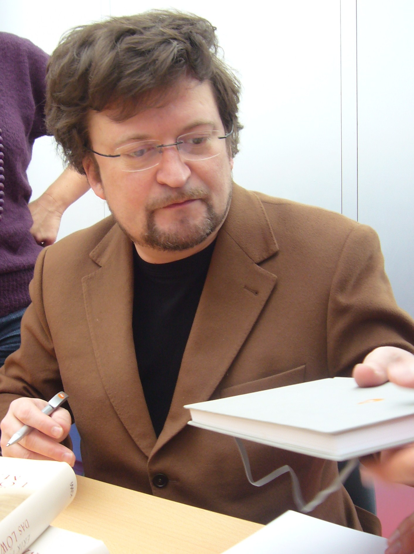 Norske forfatteren Erik Fosnes Hansen i Blaues Sofa.